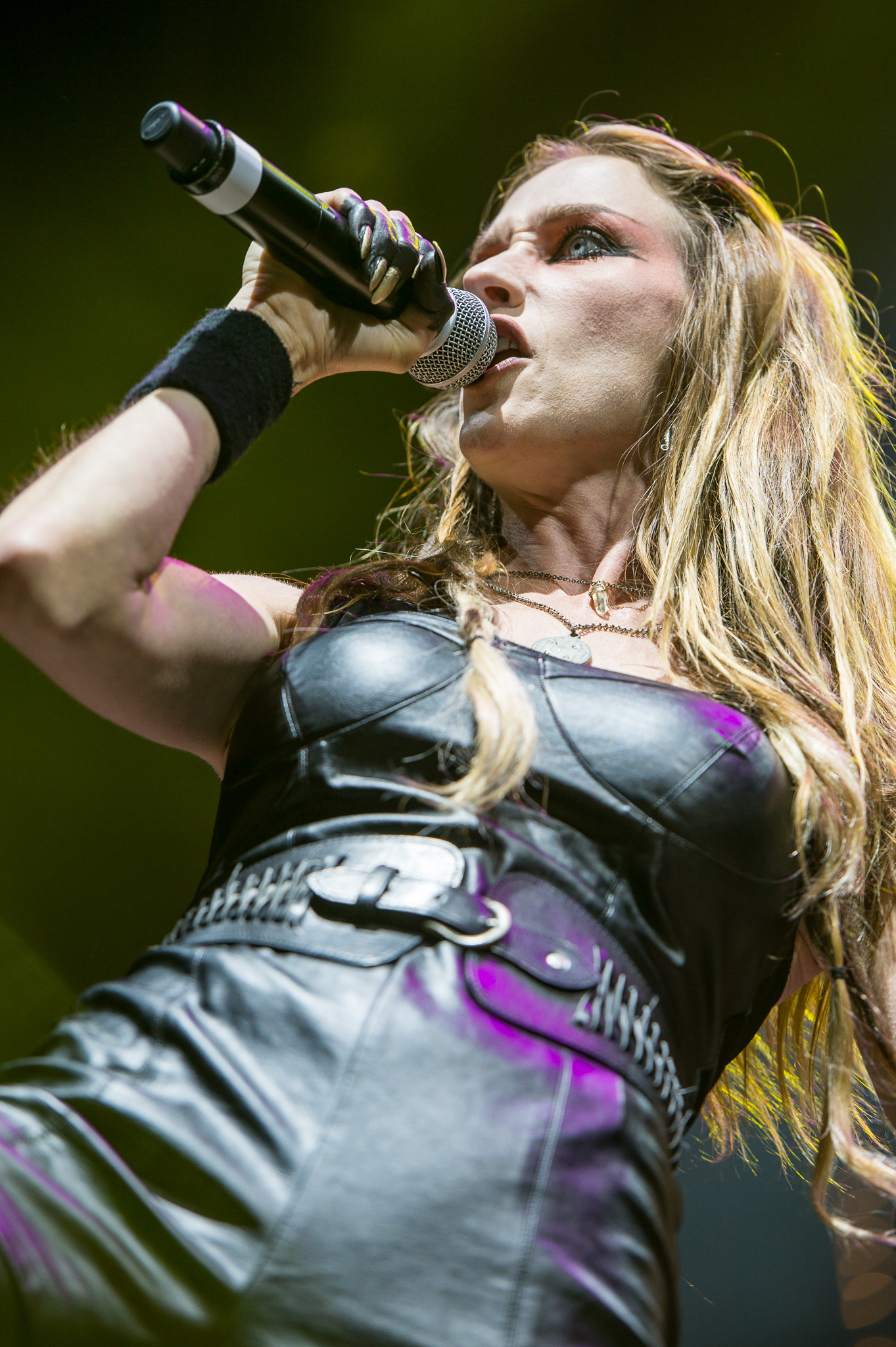 ARGO-Konzerte,Arena Nürnberger Versicherungen,Clubstage,Huntress,Jill Janus,Konzert,Livekonzert,Livemusik,Musik,RiP,Rock im Park 2014